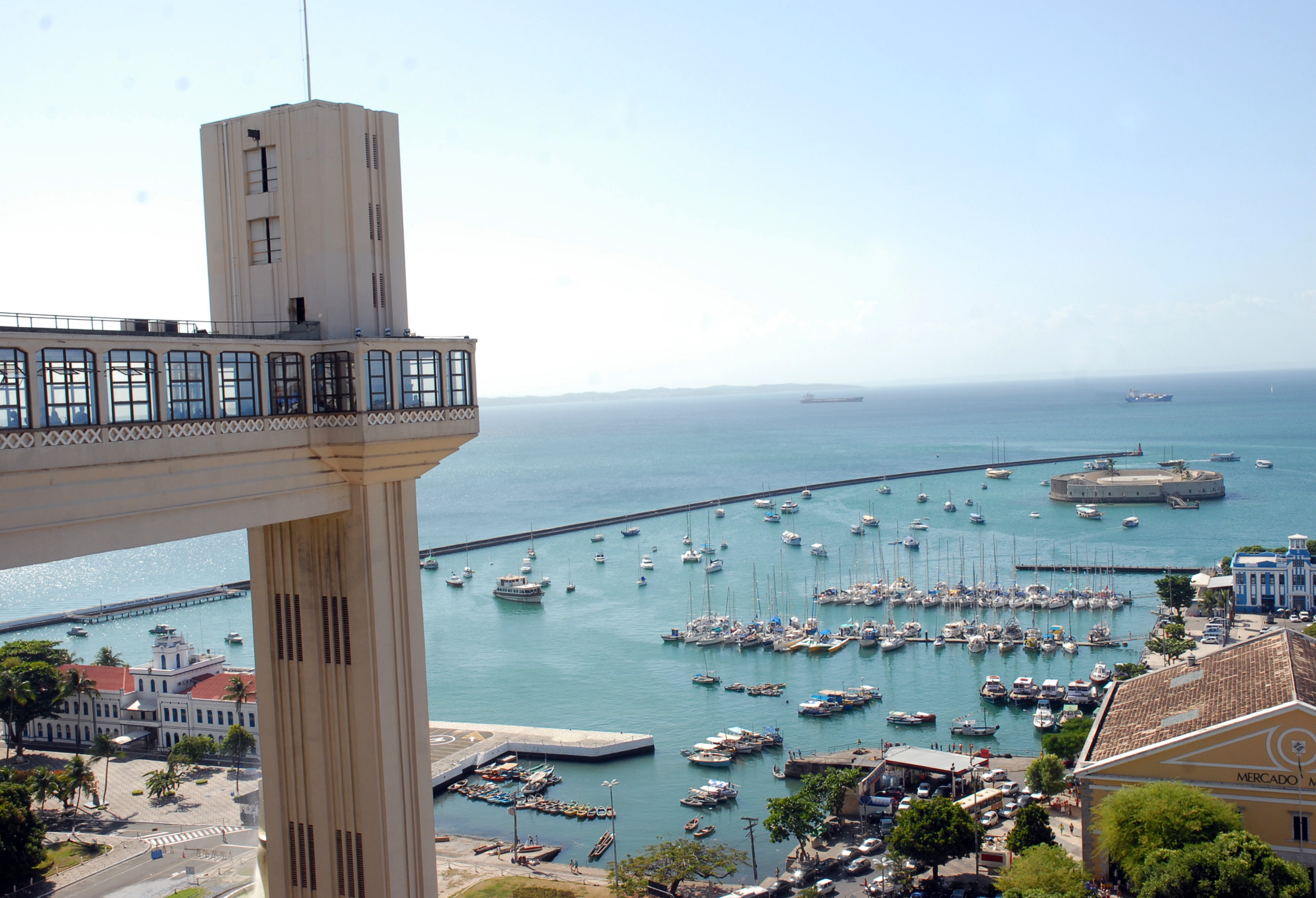 Vista da Baía de Todos os Santos, com o Elevador Lacerda